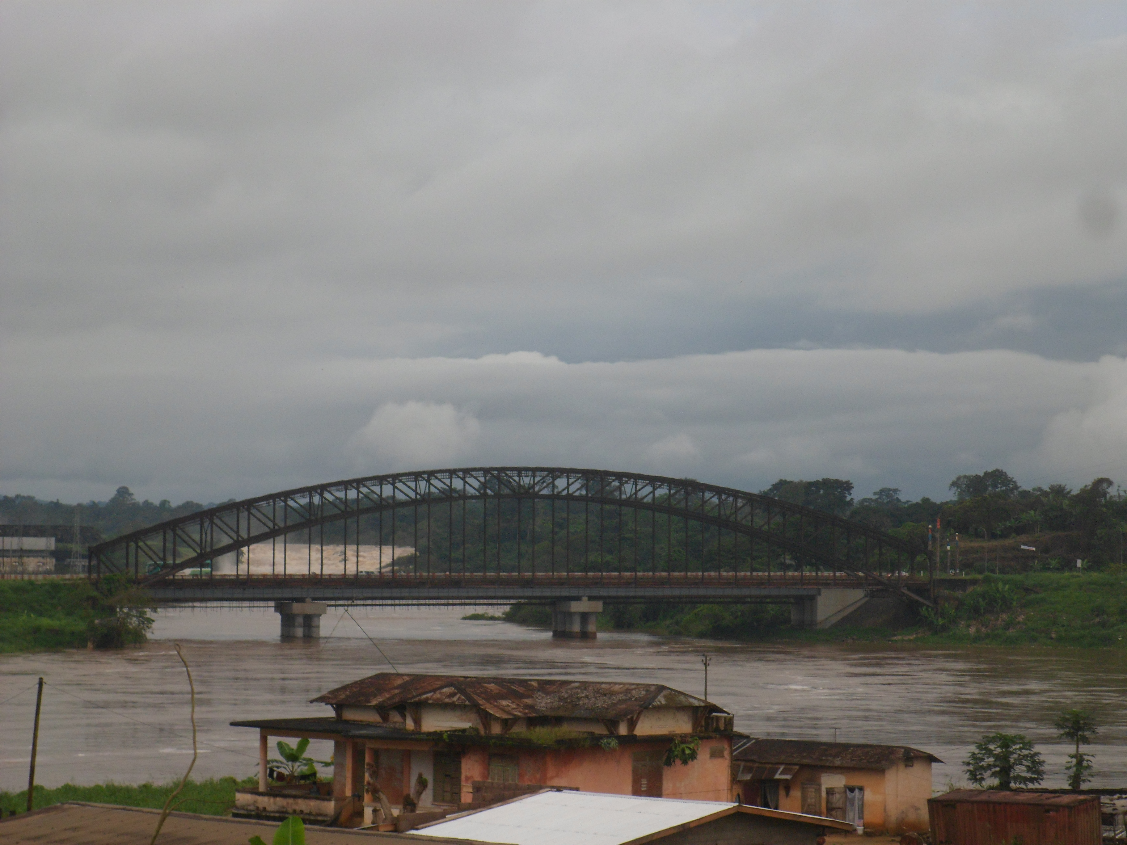 vieux pond allemand sur la sanaga